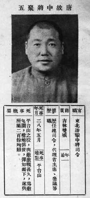 中文（台灣）: 抗戰軍人忠烈錄第一輯中的烈士遺像